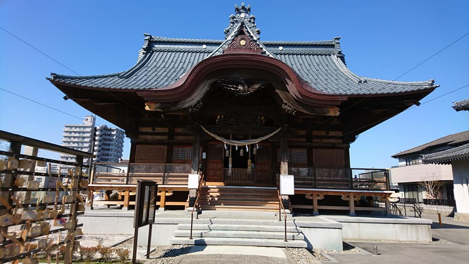 沼垂白山神社拝殿